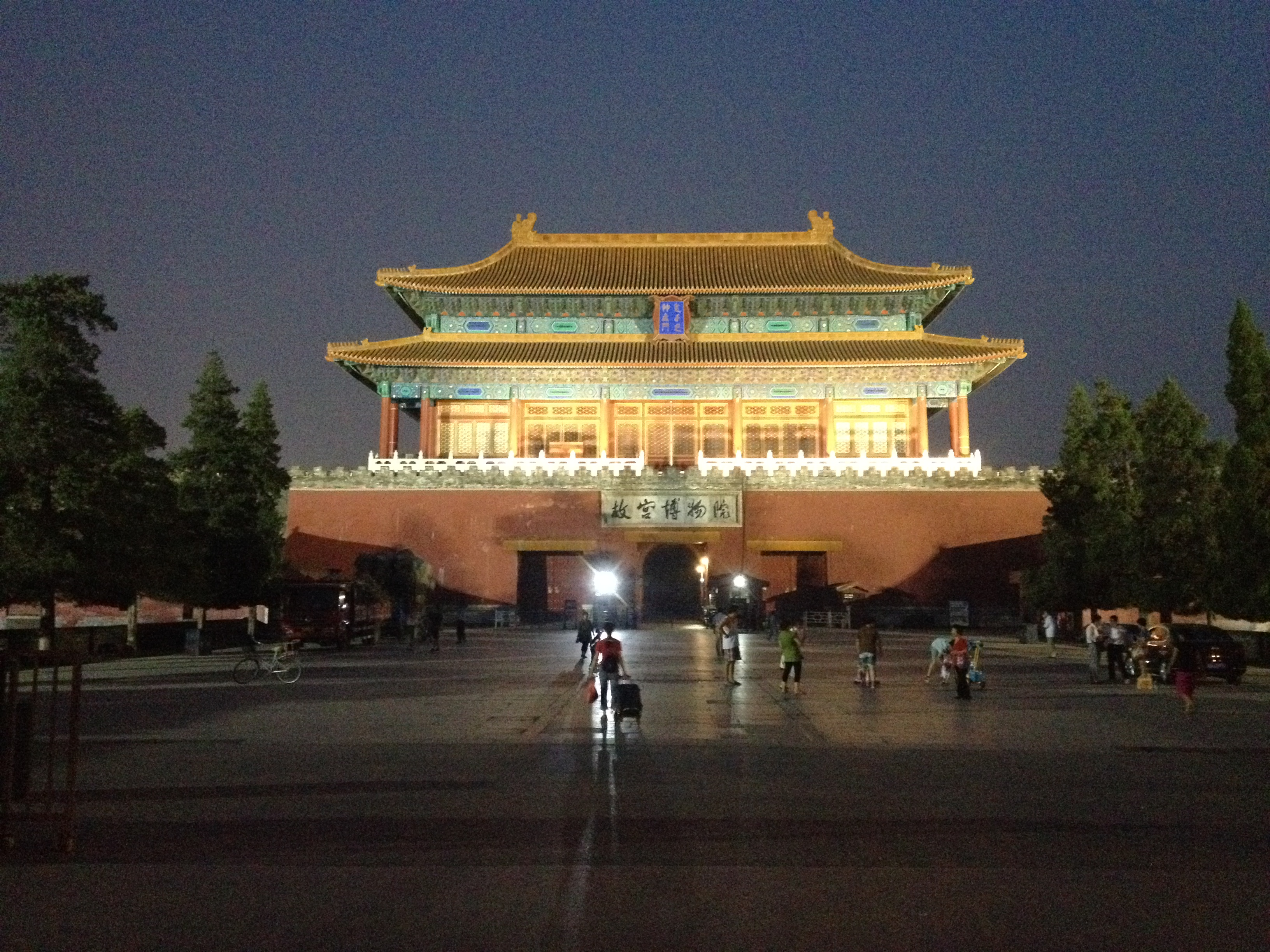 中文（中国大陆）: 故宫博物院北门，夜景